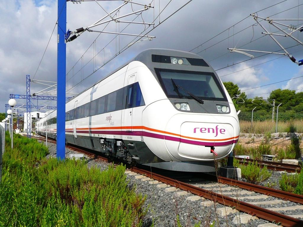 Serie 121 de Renfe en el cambador de ancho de Roda de Barà